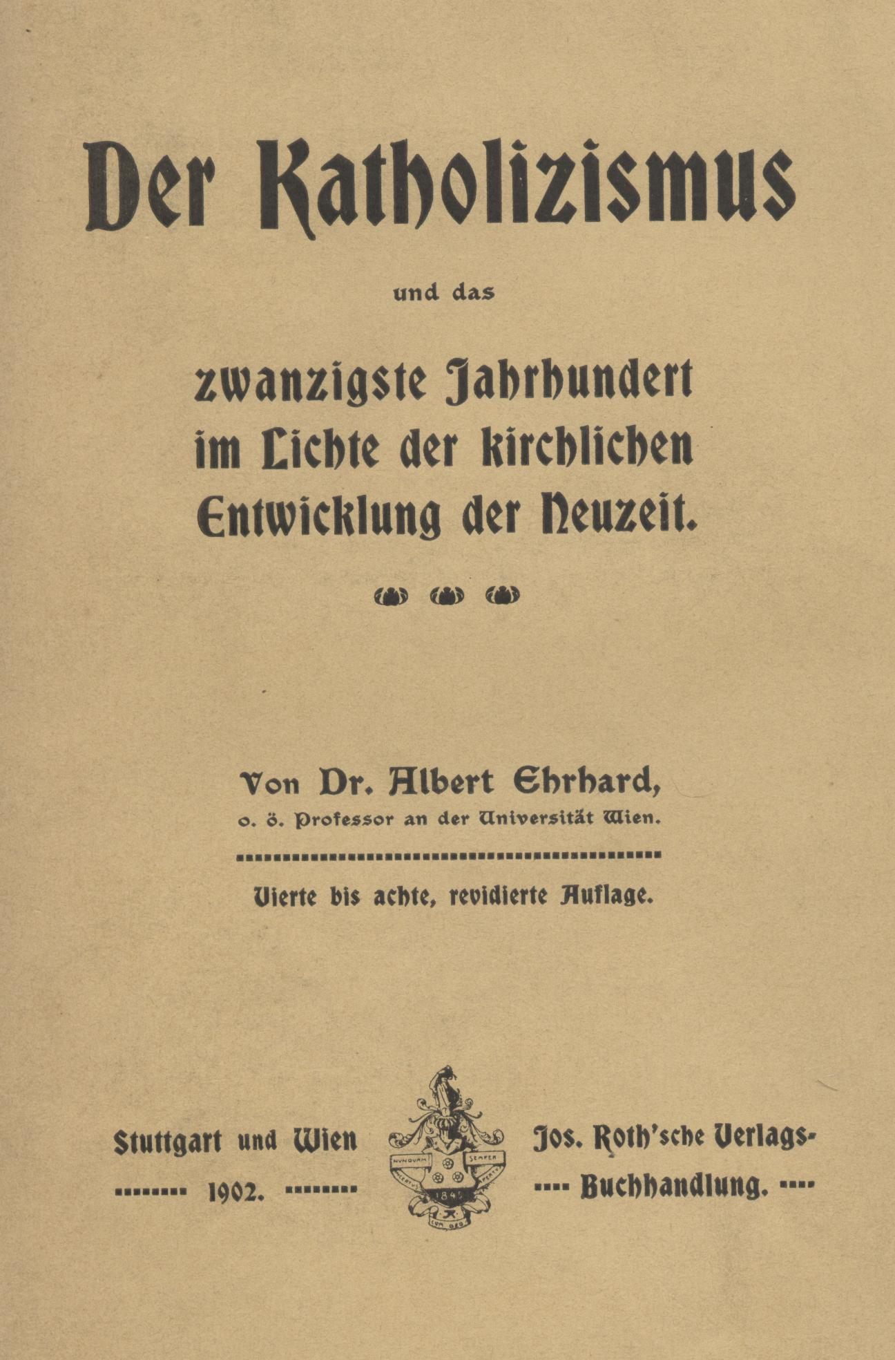 Coloman Belopotoczky Bischof, das ihm gewidmete Buch